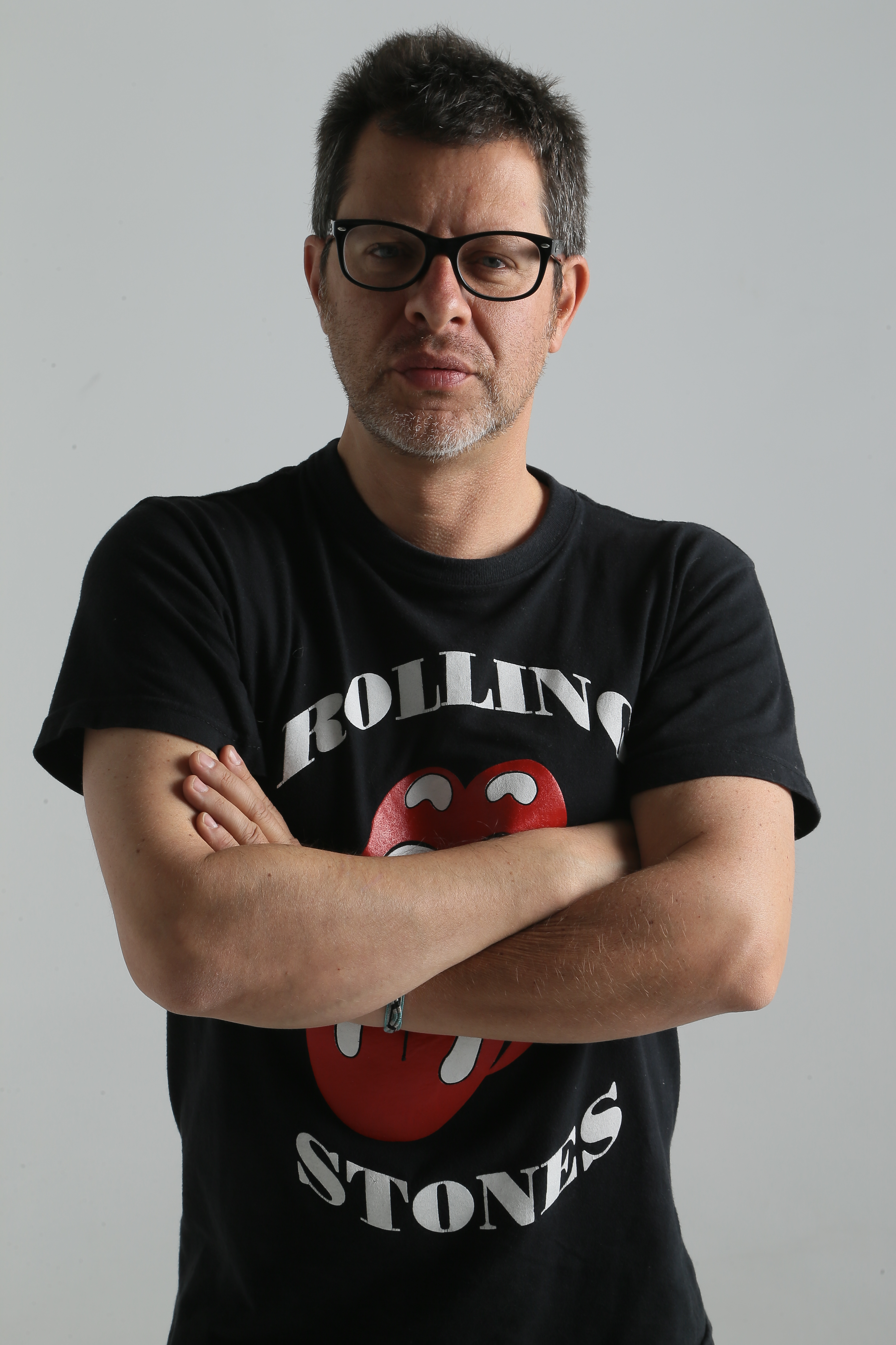 Mauricio Silva Guzmán 2015